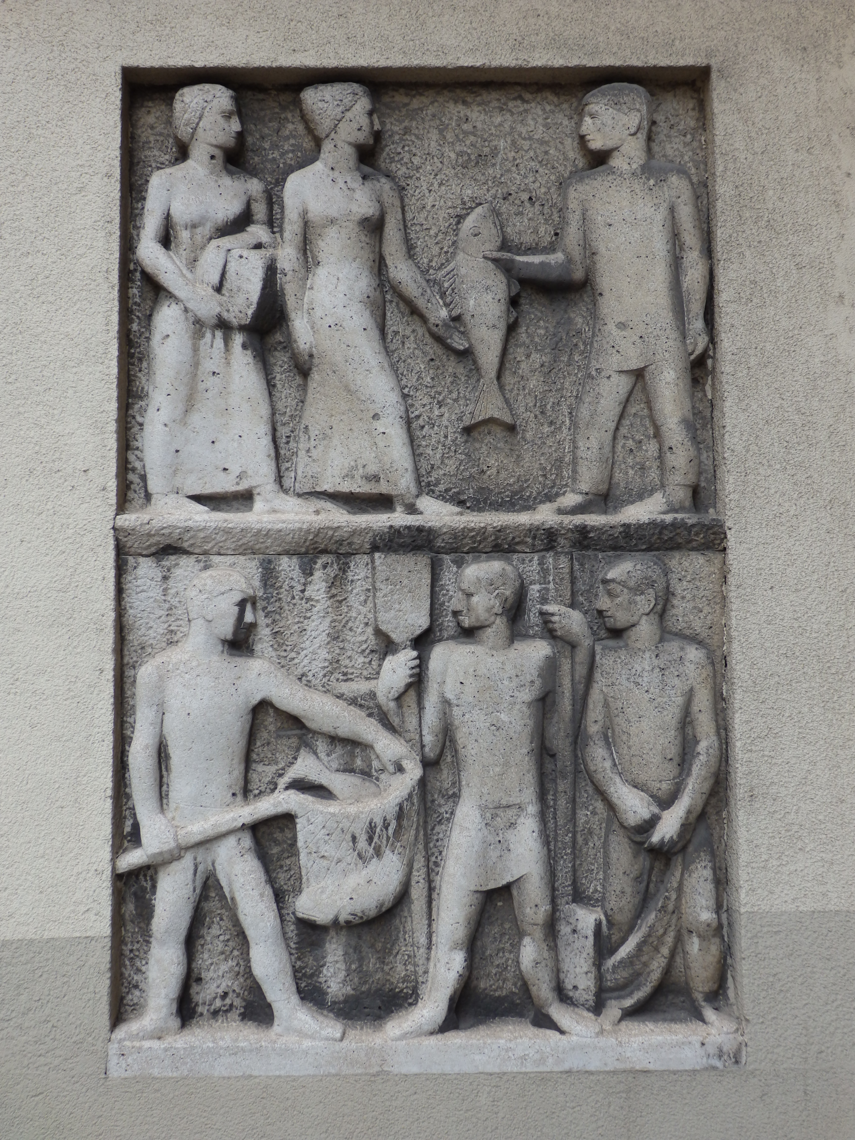 Fischhandel (1953) von Rudolf Schwaiger, Fischerstiege 1-7, Wien-Innere Stadt